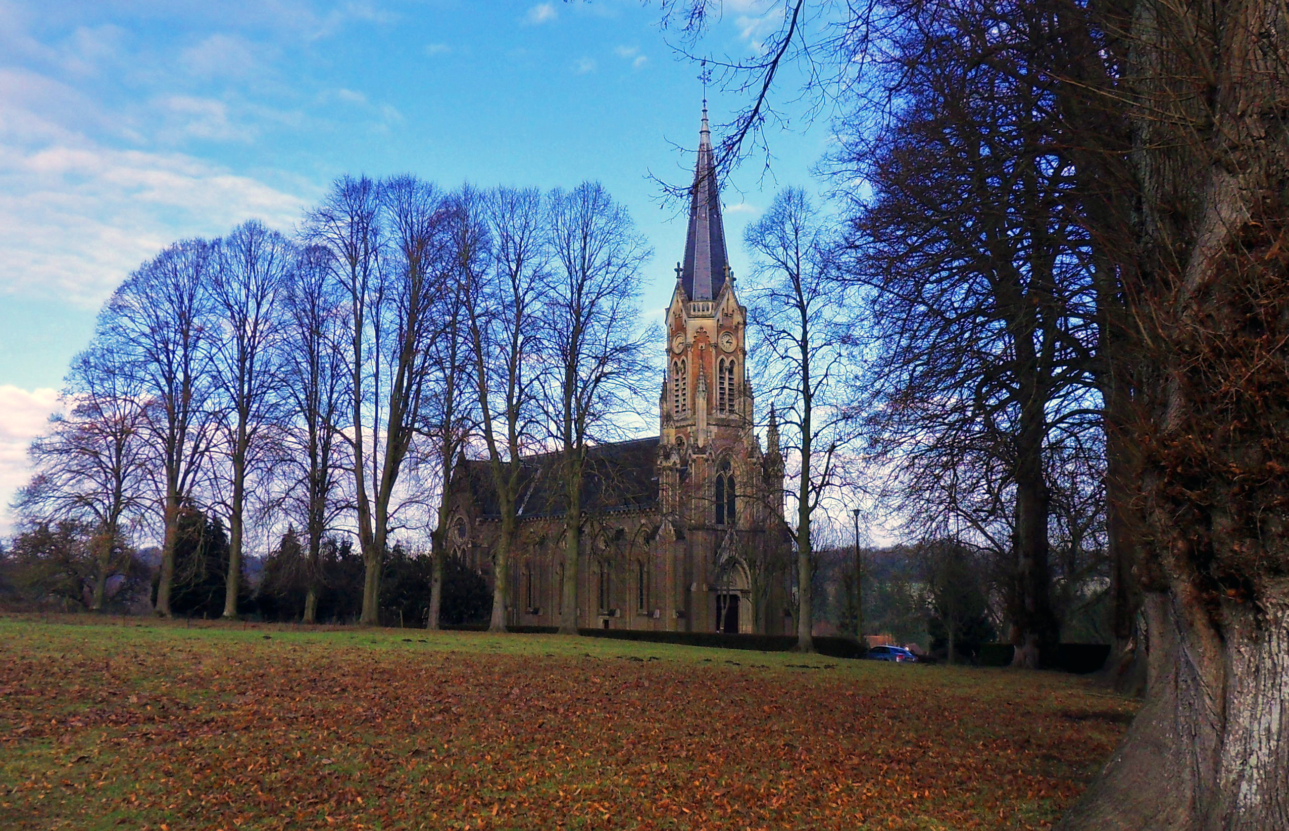 Vauchelles-lès-Domart (Somme, France). L'église aperçue depuis les environs de l'entrée du château.